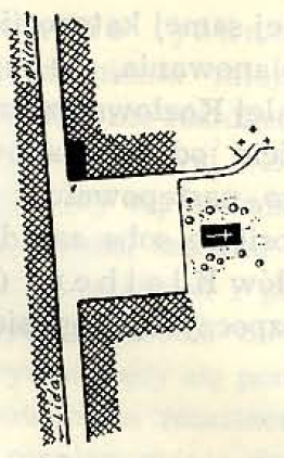 Беларуская (тарашкевіца): Канвелішкі (Kanvieliški)